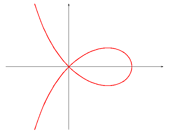 strofoida